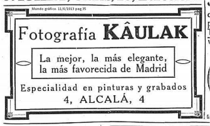 Pubblicità dello studio fotografico KAULAK di Madrid apparso su Mundo Grafico del 11-6-1913